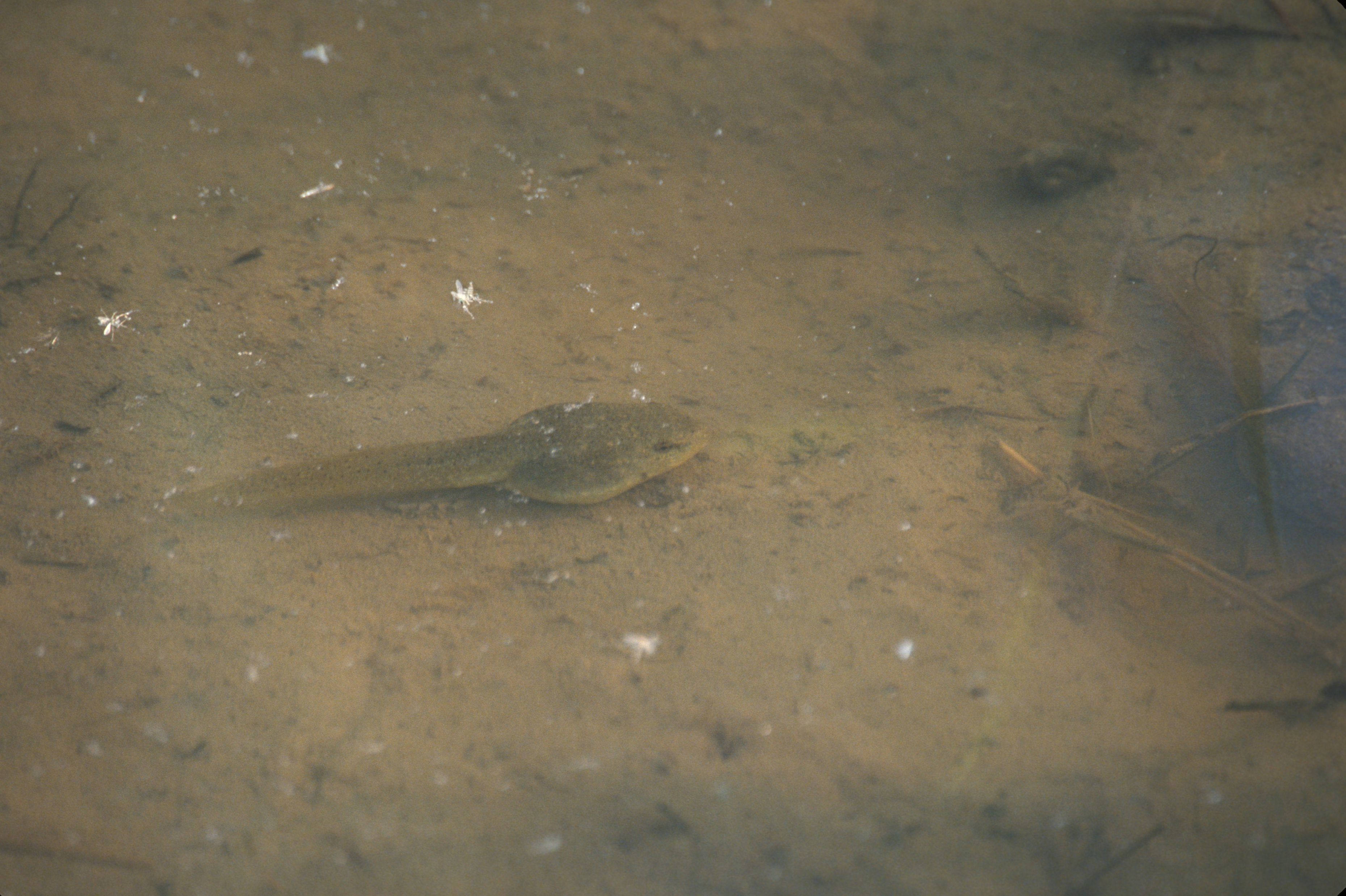 Bullfrog (Rana catesbeiana) tadpole